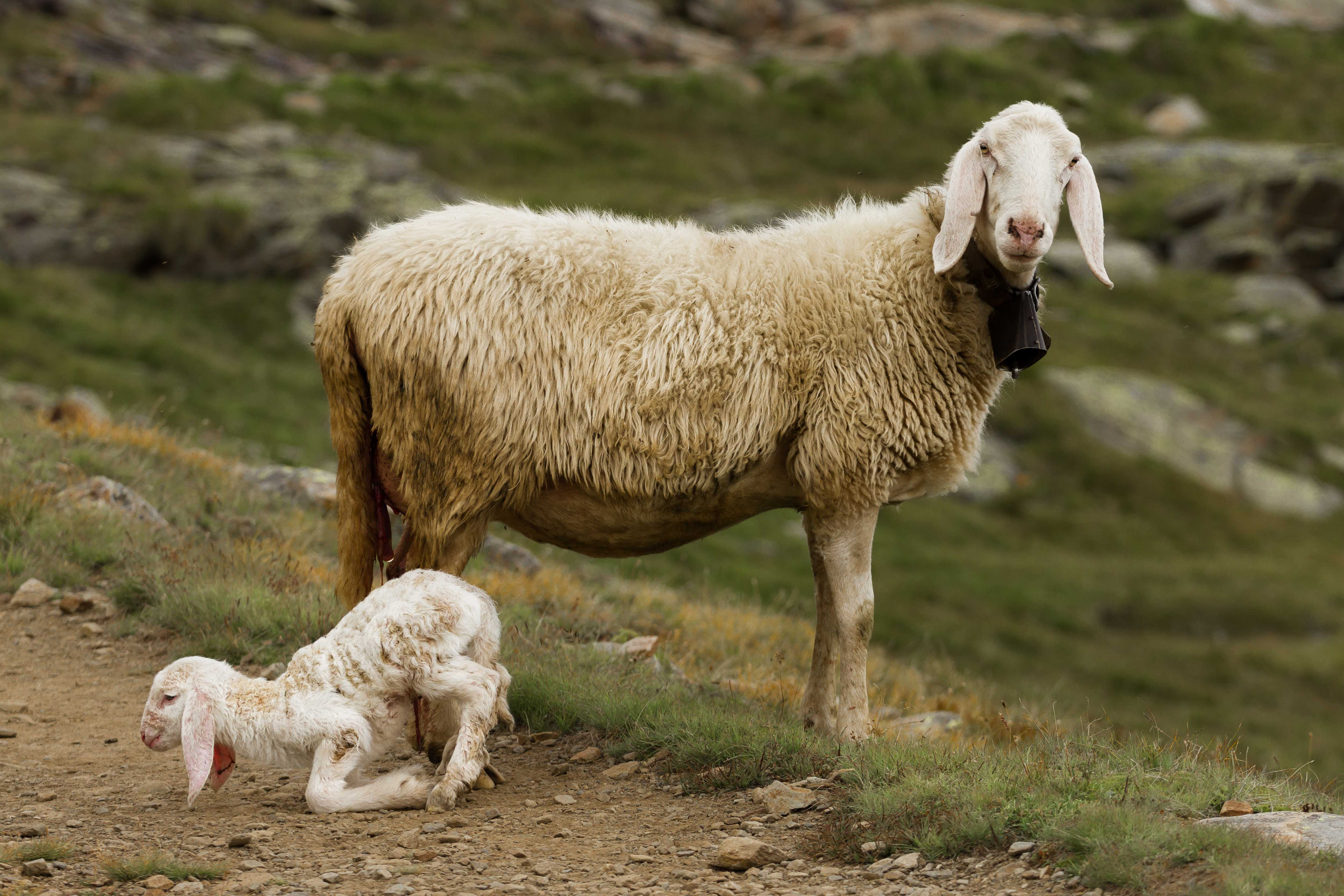 parco nazionale del Gran Paradiso (Q847690)